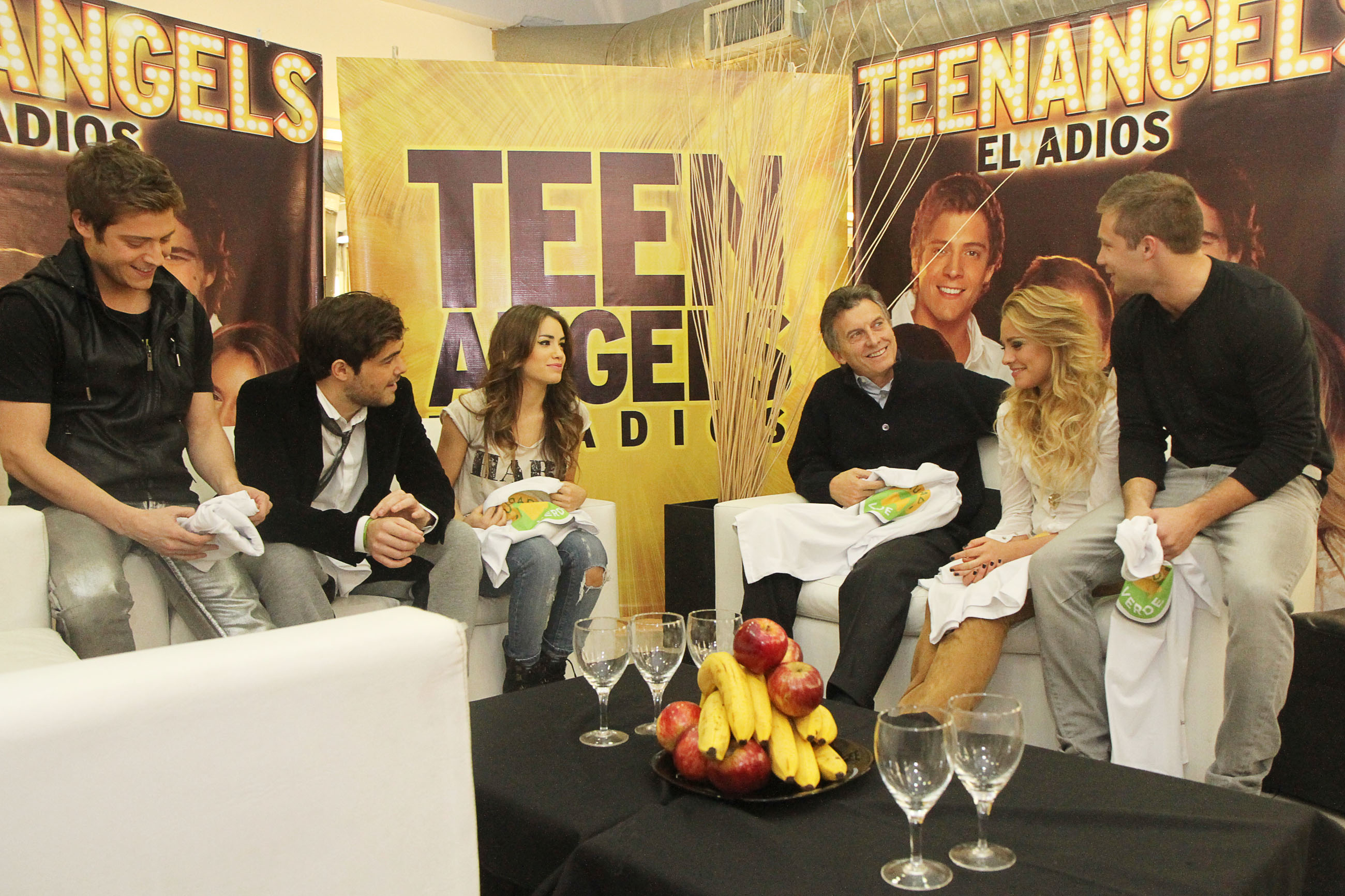 Buenos Aires. Julio 27 de 2012.- El jefe de Gobierno porteño, Mauricio Macri, se reunió hoy con los integrantes de la banda musical TeenAngels, a quienes les comentó las iniciativas que lleva adelante la Comuna en el cuidado del medio ambiente y para promover una Ciudad Verde. “Los jóvenes son quienes llevarán adelante nuestras políticas de protección ambiental para tener la Ciudad Verde que todos queremos”, dijo Macri en el encuentro con los cantantes realizado en el Teatro Gran Rex. El Jefe de Gobierno mencionó que la instalaciones de contenedores para residuos reciclables y las campañas de concientización puestas en marcha van en sintonía con las medias adoptadas para favorecer el uso de bicicletas y colectivos, por las cuales se instalaron ciclovías y carriles exclusivos para el transporte público. Foto: Matías Repetto Bonpland/GCBA